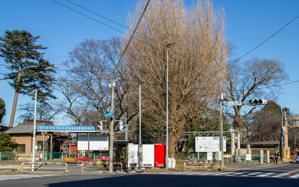 三里塚交差点